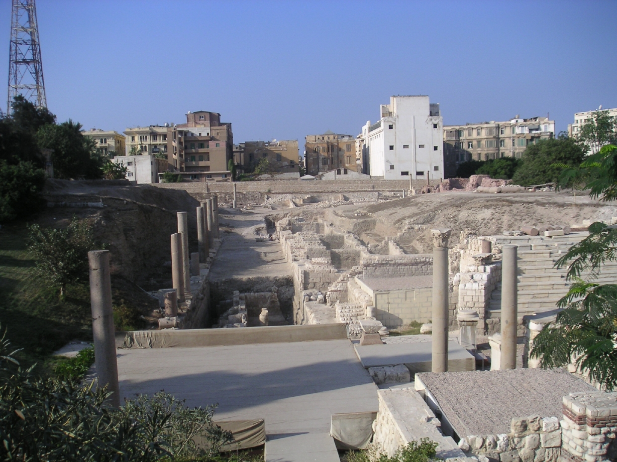 Vue des ruines de l'Alexandrie antique dans le quartier de Kom el-Dik à Alexandrie